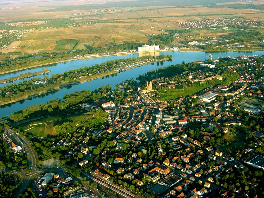 Luftbild von Breisach aufgenommen bei einer Ballonfahrt